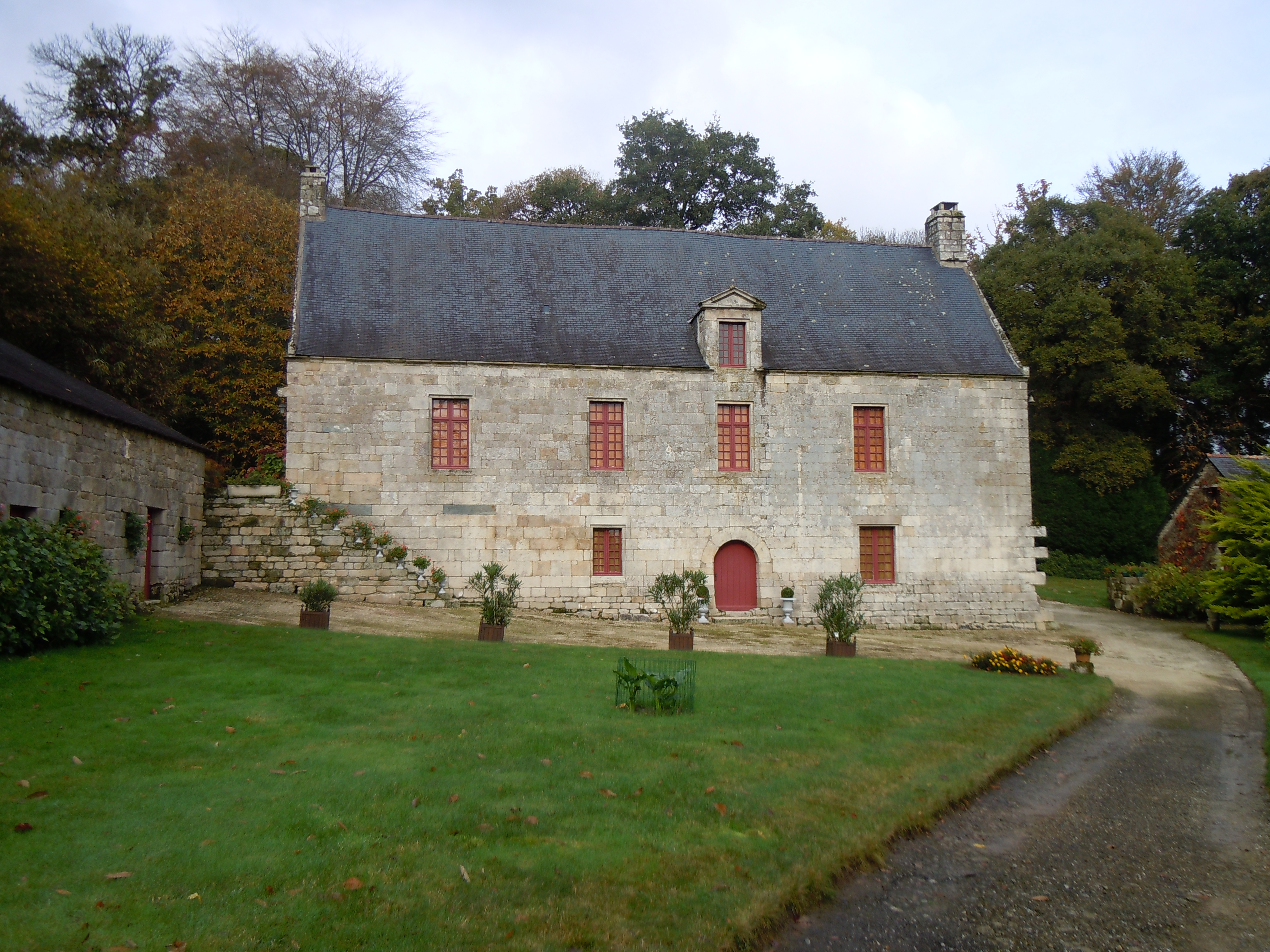 logis principal du manoir de Kerservant situé sur la commune de Ploërdut (département du Morbihan) .